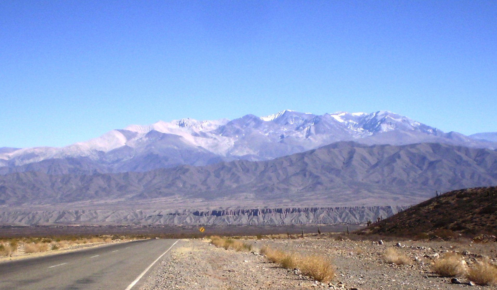 Al fondo el Nevado de Cachi desde la ruta 33 próximo a la localidad de Payogasta, Salta.